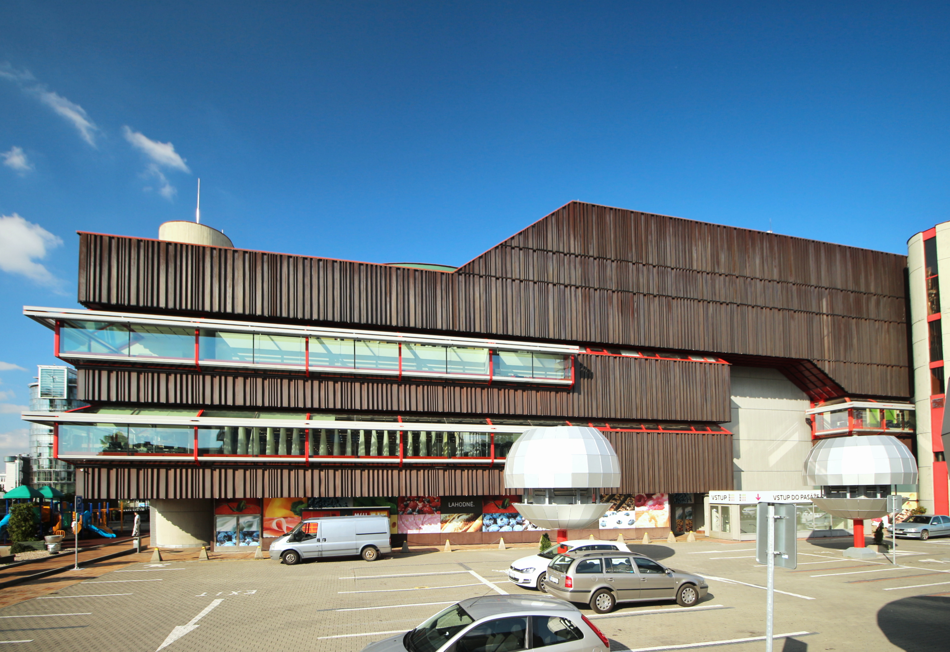 Praha, Budějovická - Dům bytové kultury